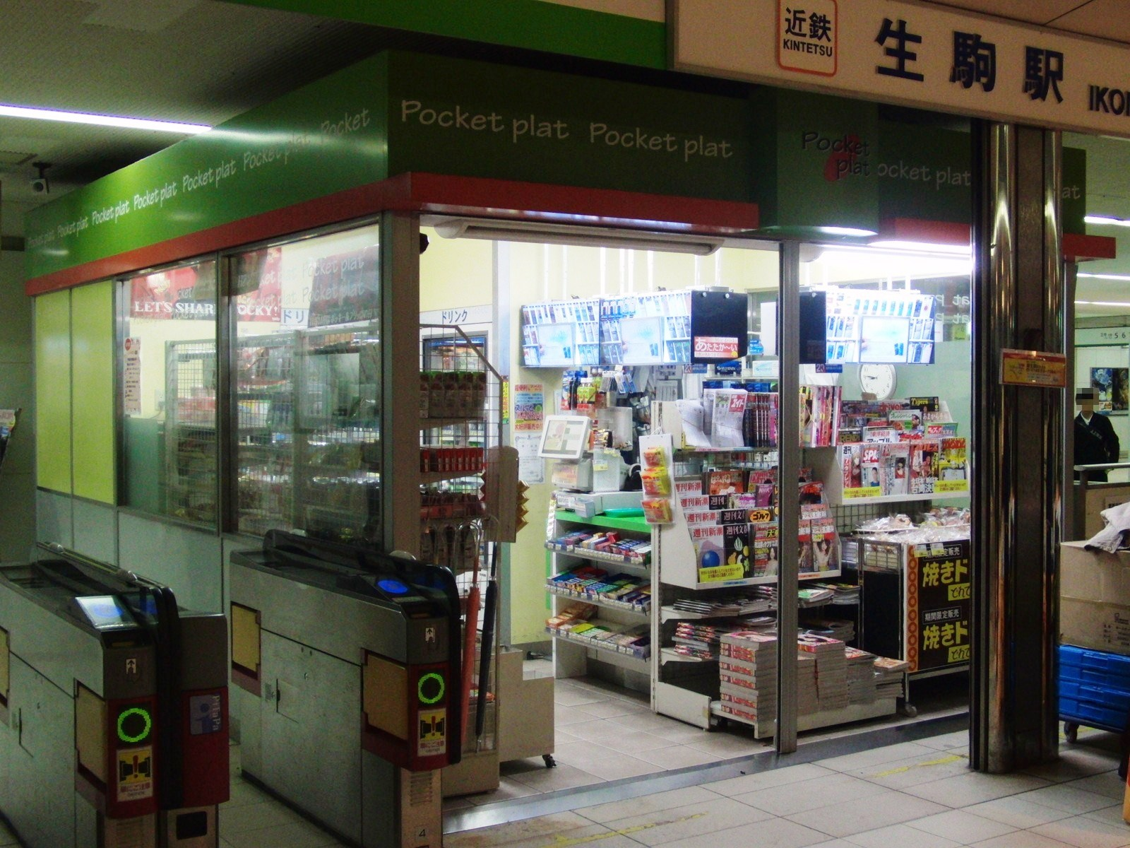 けいはんな線生駒駅にあるポケットプラットを撮影